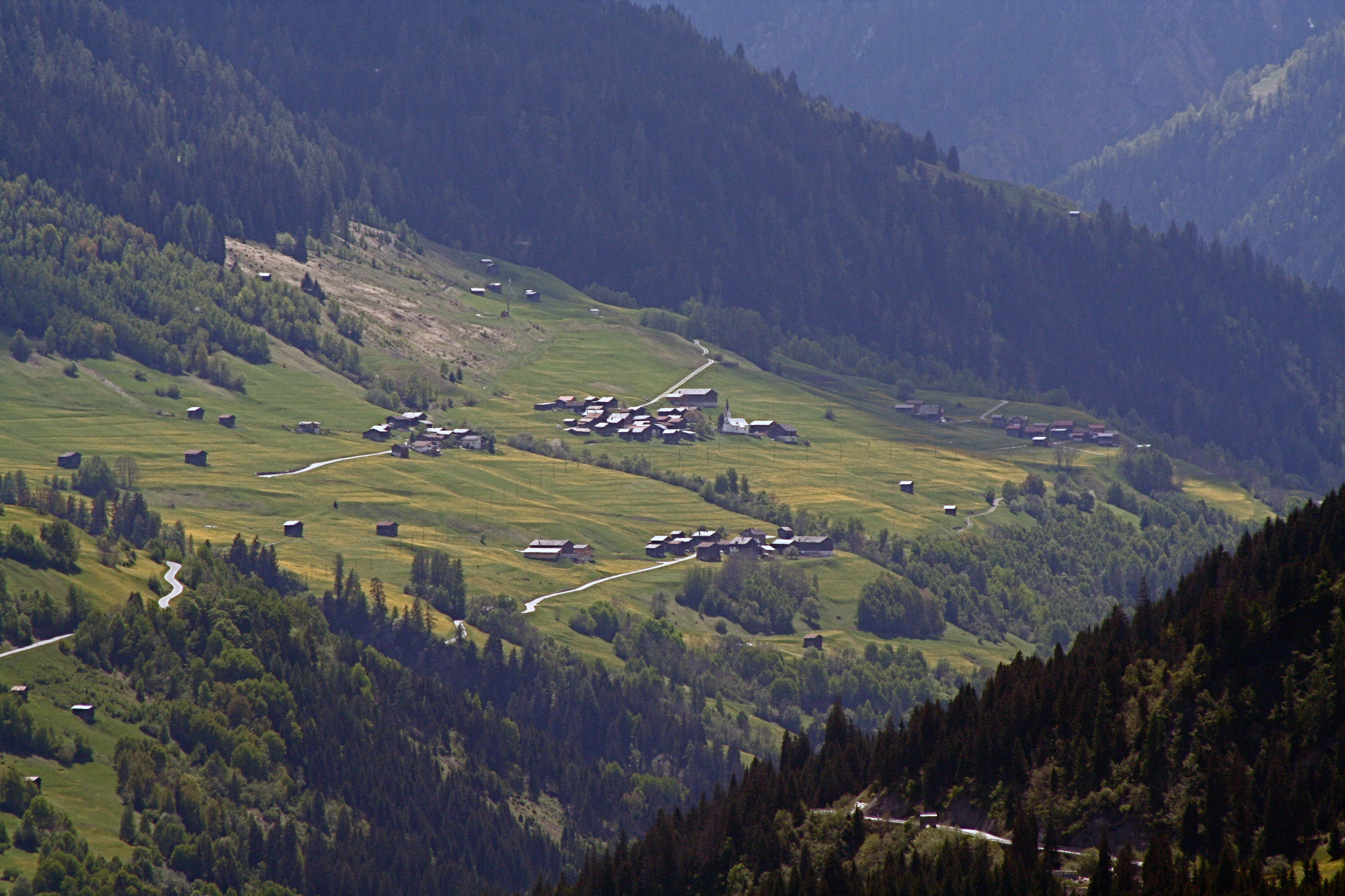 Camuns von Falera aus gesehen